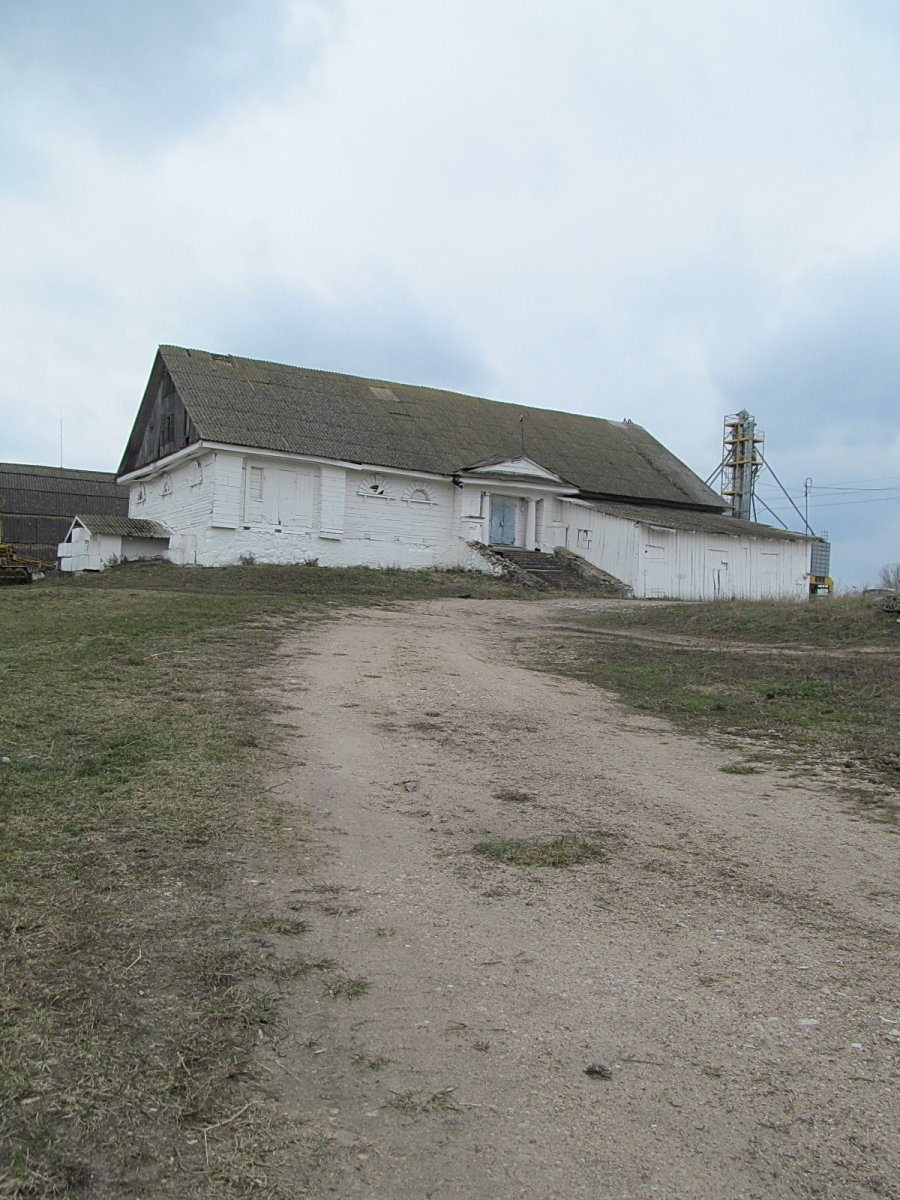 Радзівілімонты. Свіран